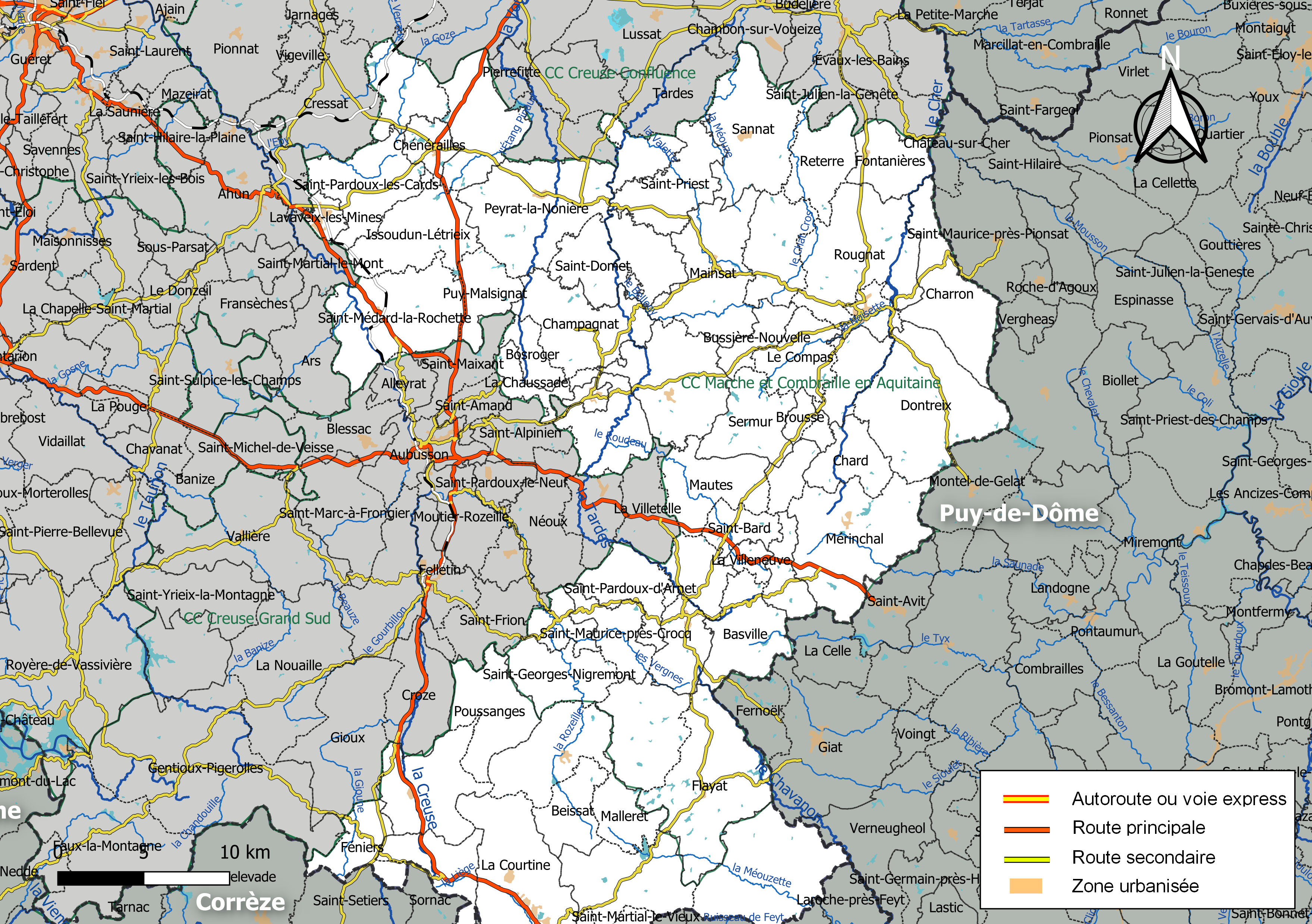 Carte géographique de la Communauté de communes Marche et Combraille en Aquitaine, département de la Creuse, France. Composition au 1er janvier 2019.